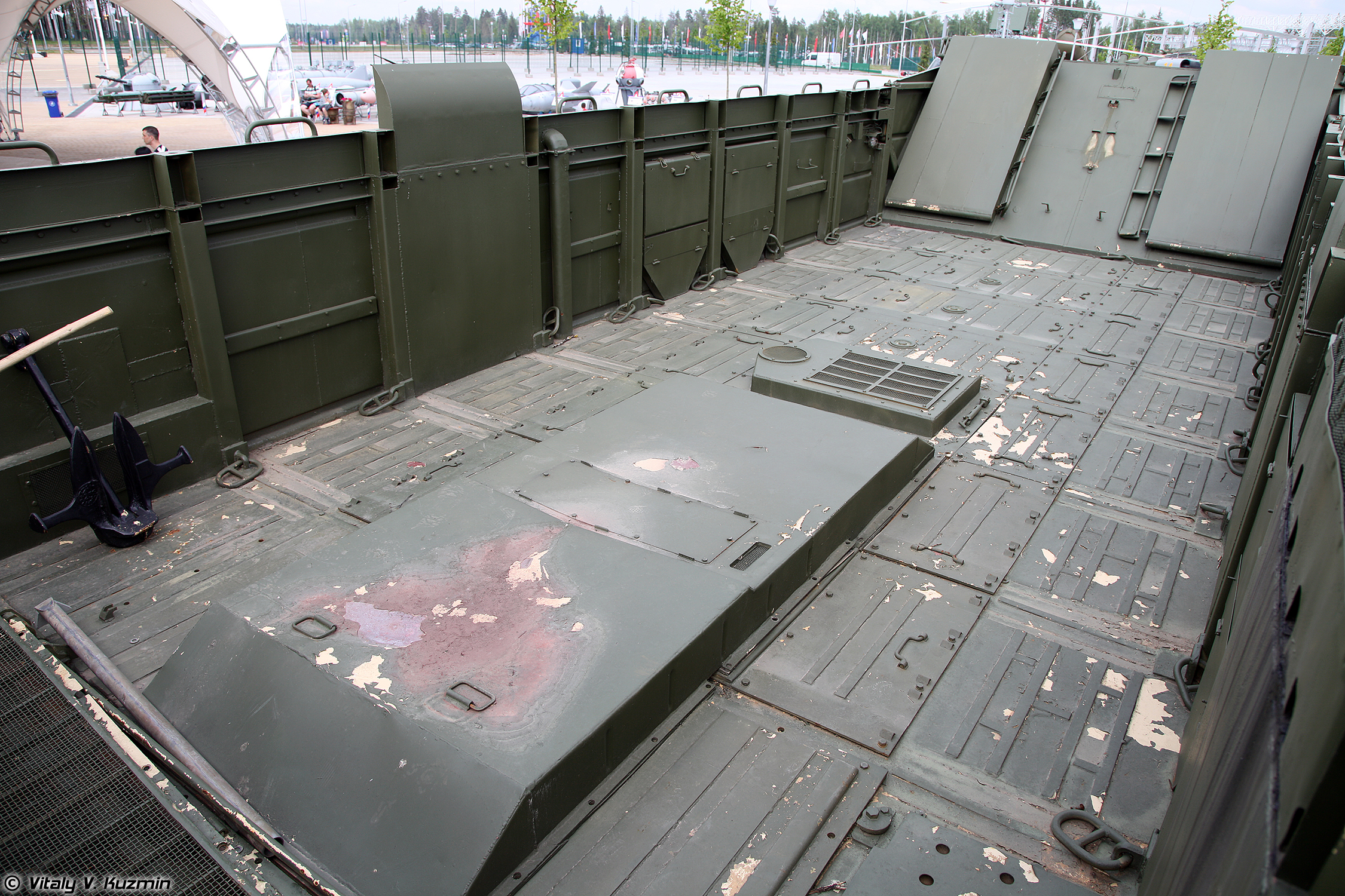 Транспортер ПТС-4 (PTS-4 amphibious transport)